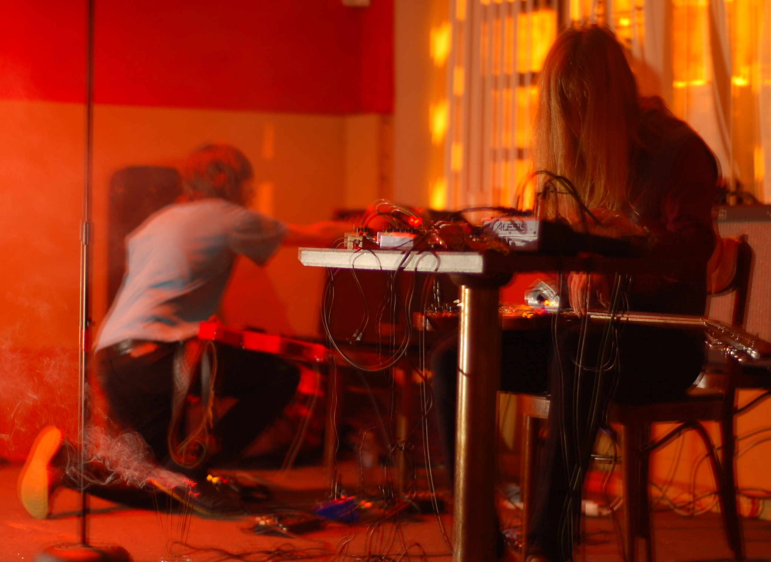 Matthew Bower, Marcia Bassett en concert avec Hototogisu